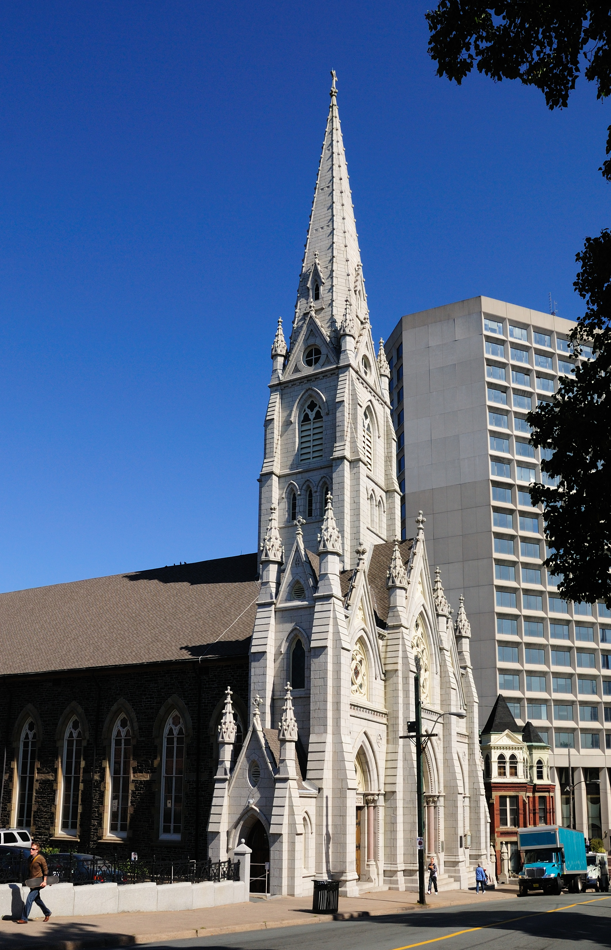 Halifax: St. Mary’s Basilica von der Spring Garden Road